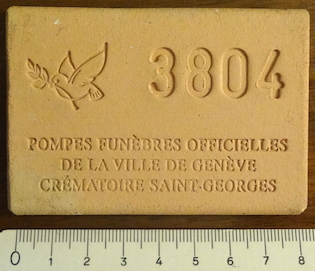 Brique réfractaire utilisée pour identifier un corps lors d'une crémation à Genève en 2005. Dimensions 80 x 55 x 8 mm. « Pompes funèbres officielles de la ville de Genève - Crématoire Saint-Georges ».